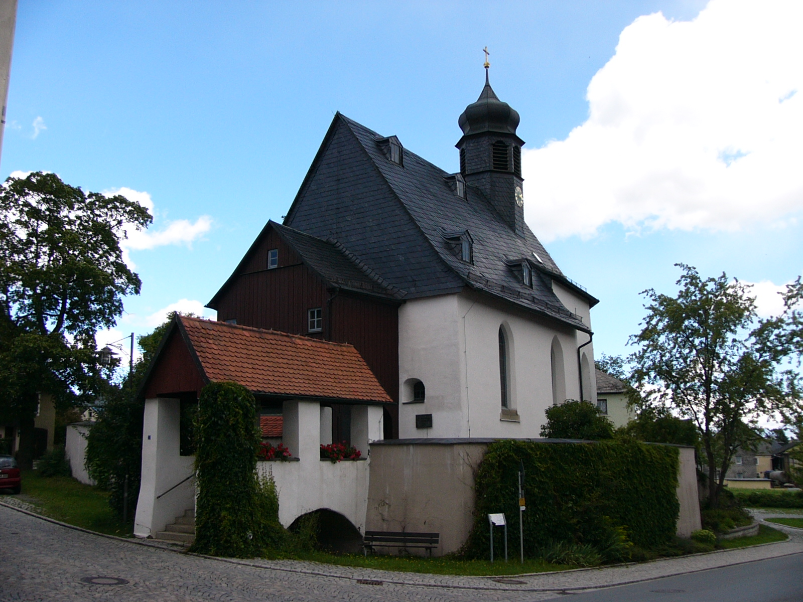 Leonhardskirche Köditz